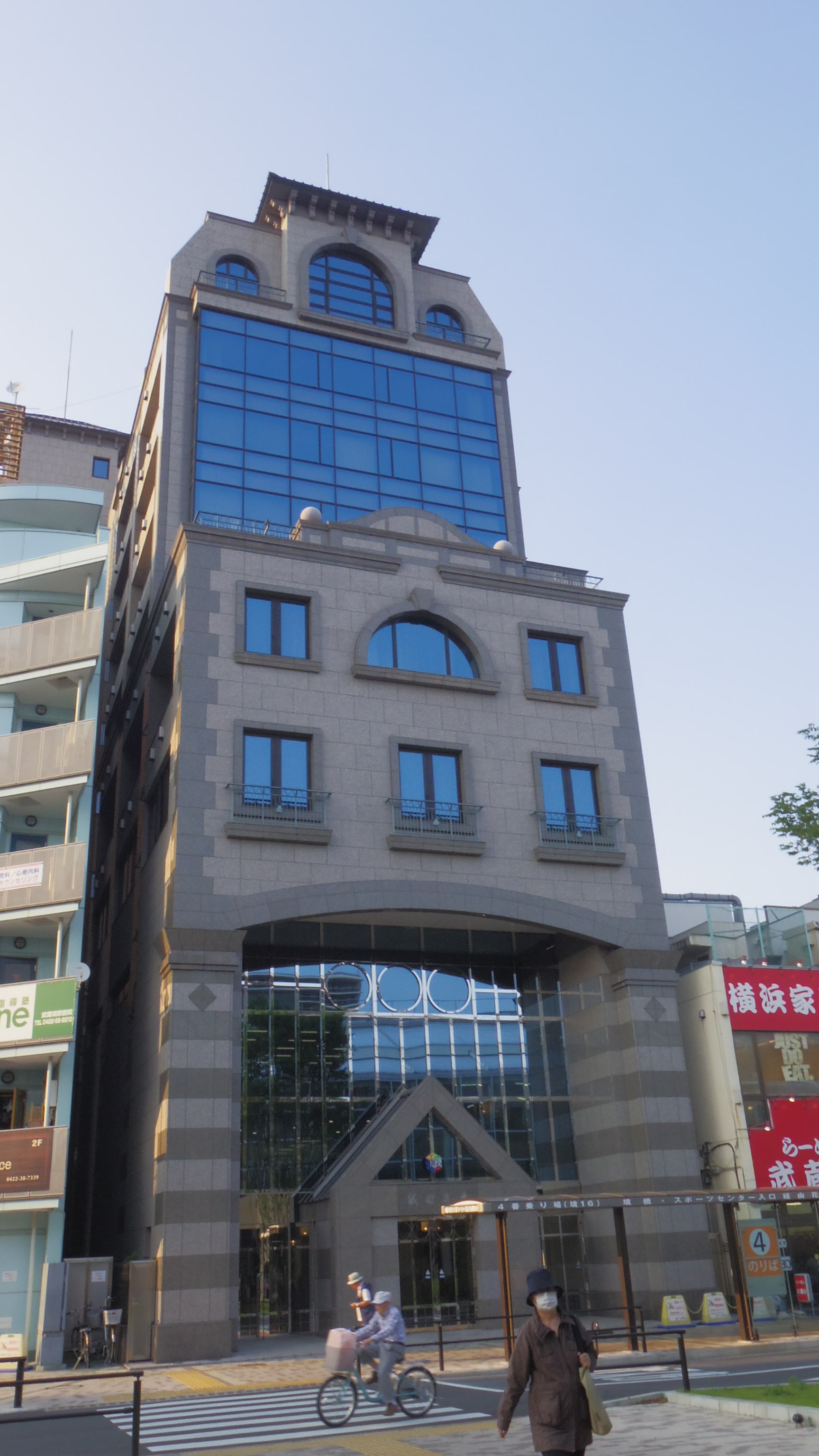 飯田産業本社。JR武蔵境駅北口から撮影（2016年5月22日撮影）